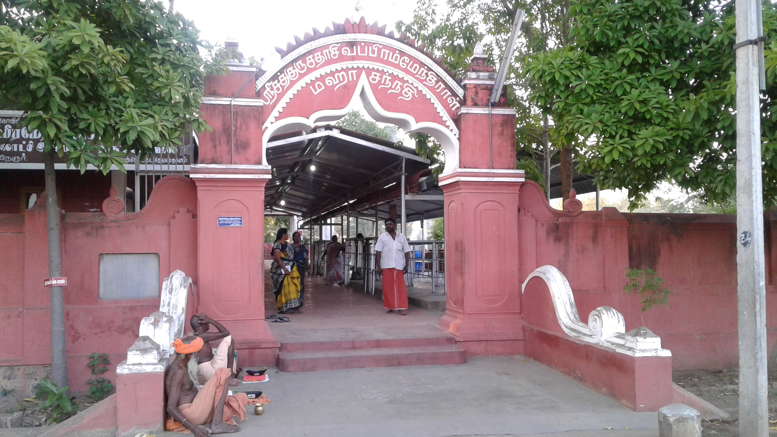 Sadasiva Brahmendra samathi - சதாசிவ பிரம்மேந்திரர் சமாதி